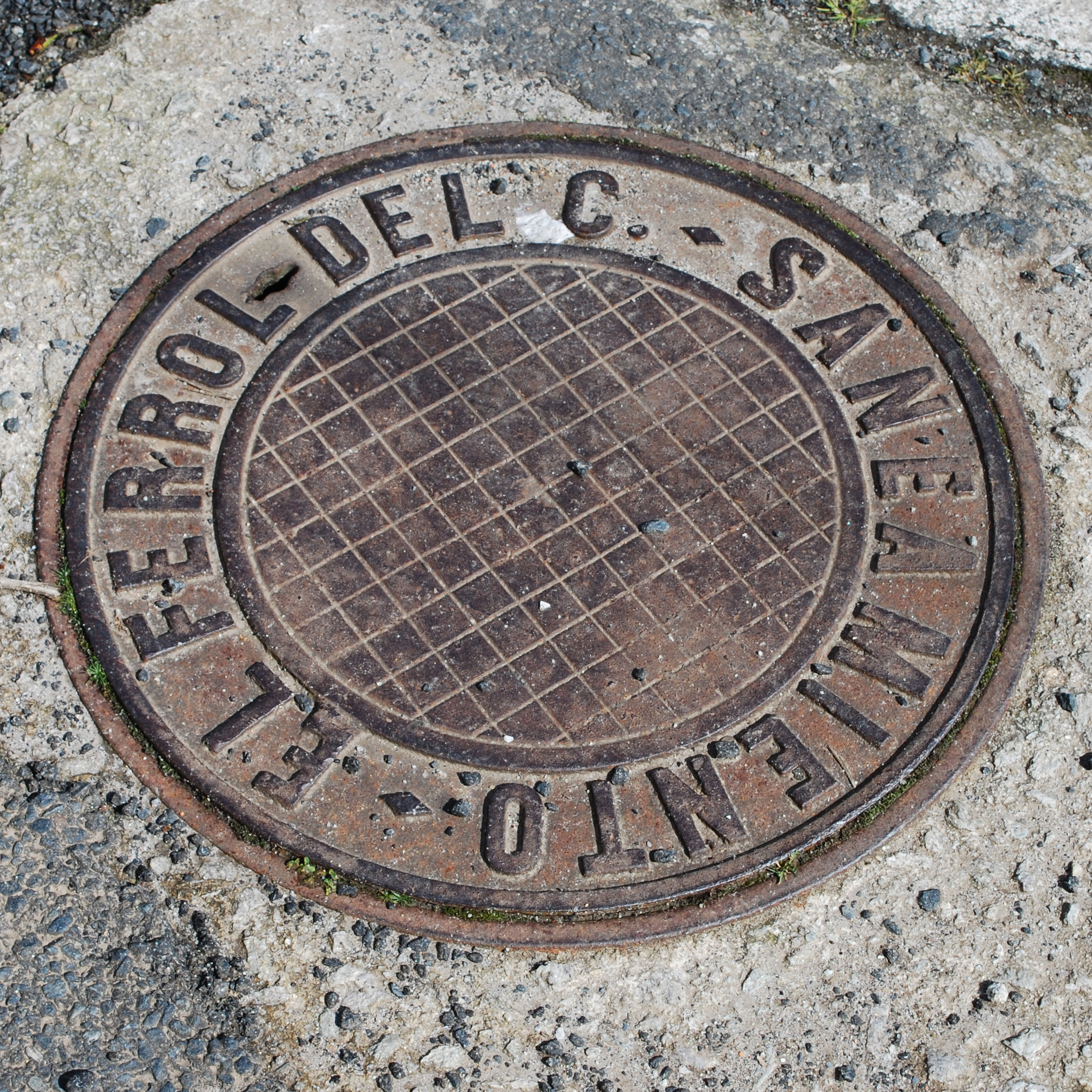 Tapa de alcantarilla de saneamiento El Ferrol del Caudillo A Coruña Galiza Spain